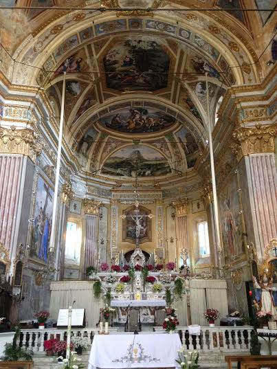 Chiesa parrocchiale di San Pietro nel comune di Rialto (SV) Italy